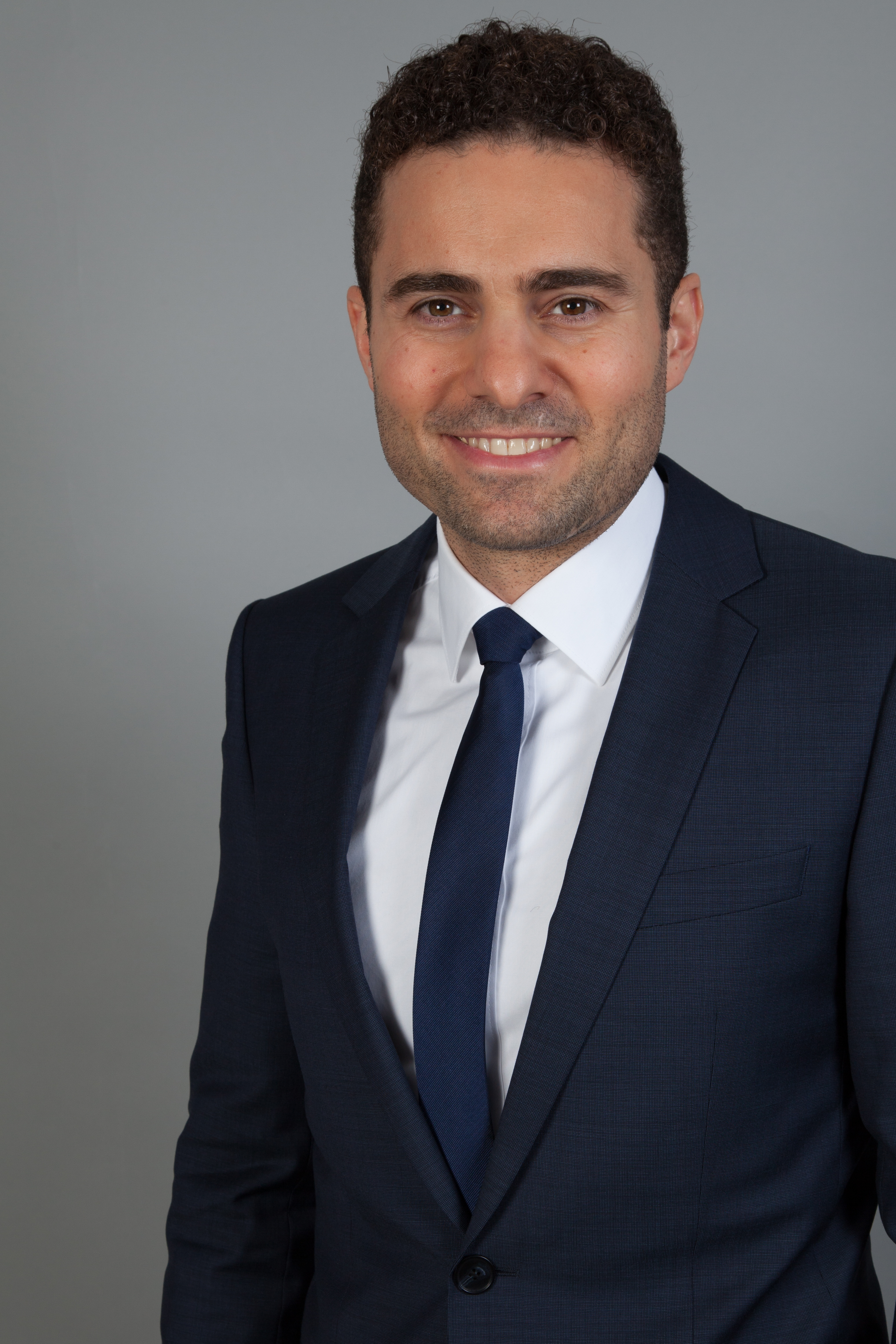 Oguzhan Yazici, Abgeordneter der Bremischen Bürgerschaft